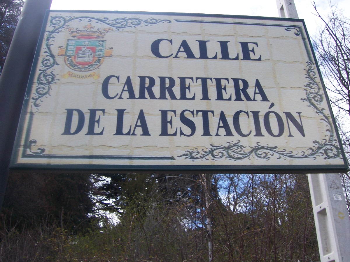 Esta es una fotografía del cartel de la pista asfaltada que conduce a la estación de Tablada (Madrid). Esta fotografía la hice yo mismo el día 3 de Abril del año 2007. En este caso la cedo amablemente a wikipedia para su enciclopédico uso.